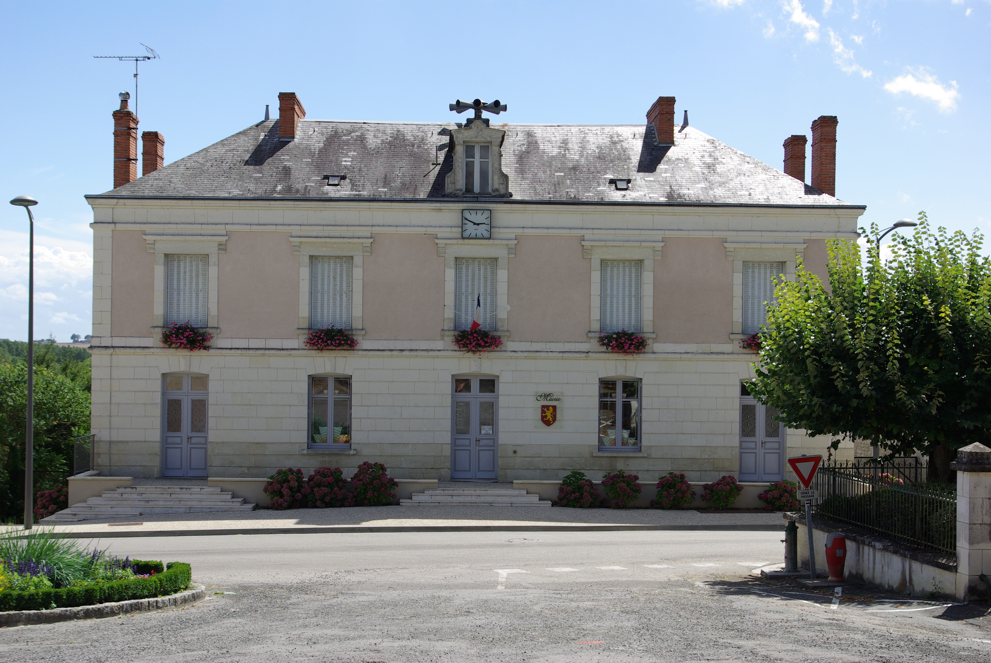 Mairie de Palluau-sur-Indre.